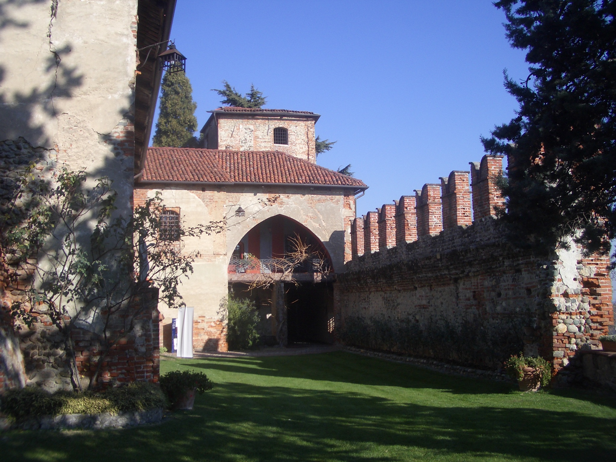 The castle, Moncrivello, Vercelli, Italy